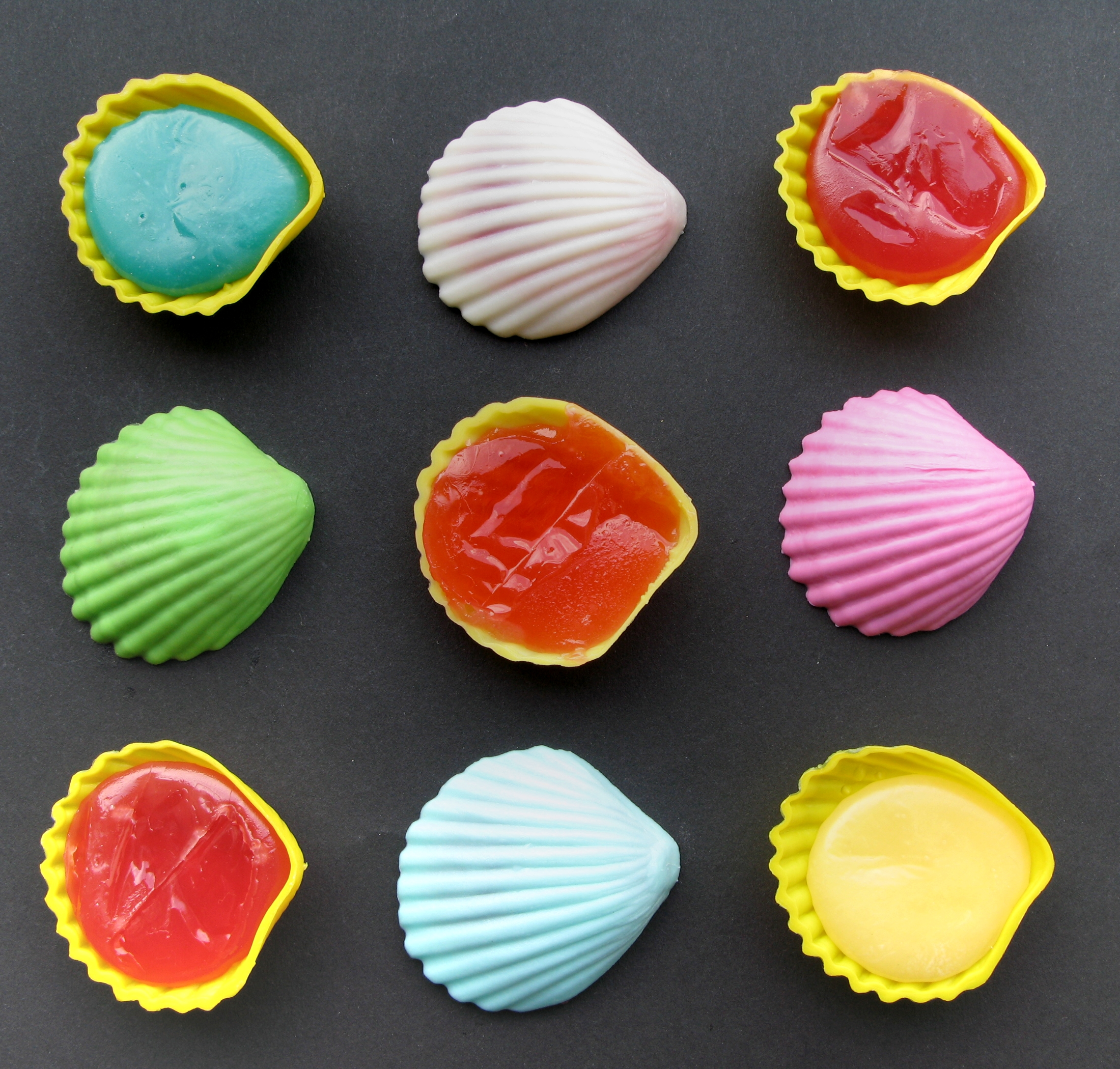 Schleckmuscheln mit verschiedenen Farben und Füllungen